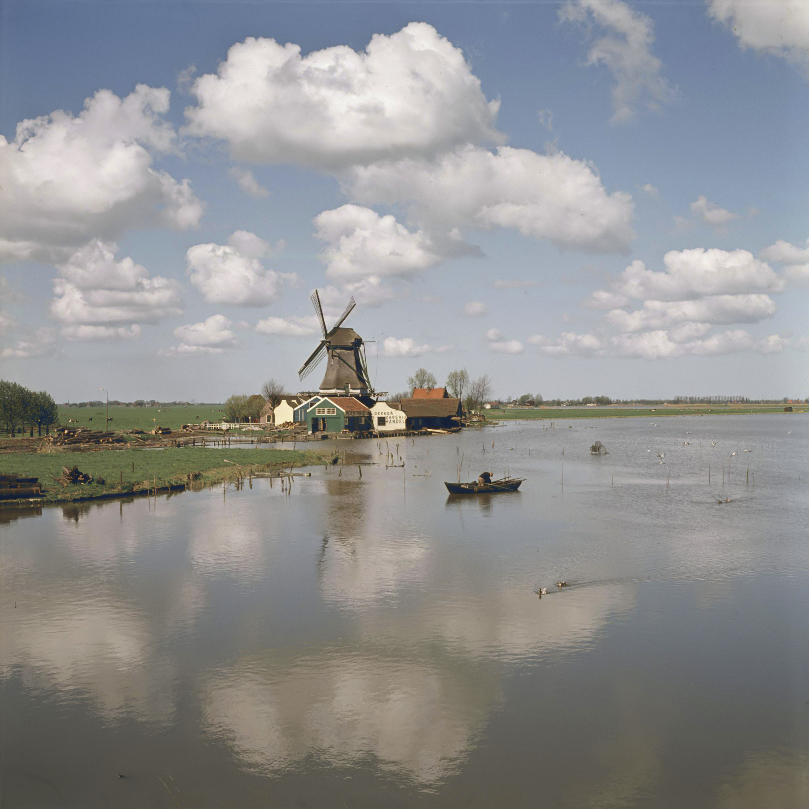 Reportage Nederland: Houtzaagmolen De Vriendschap bij Monnickendam 1960